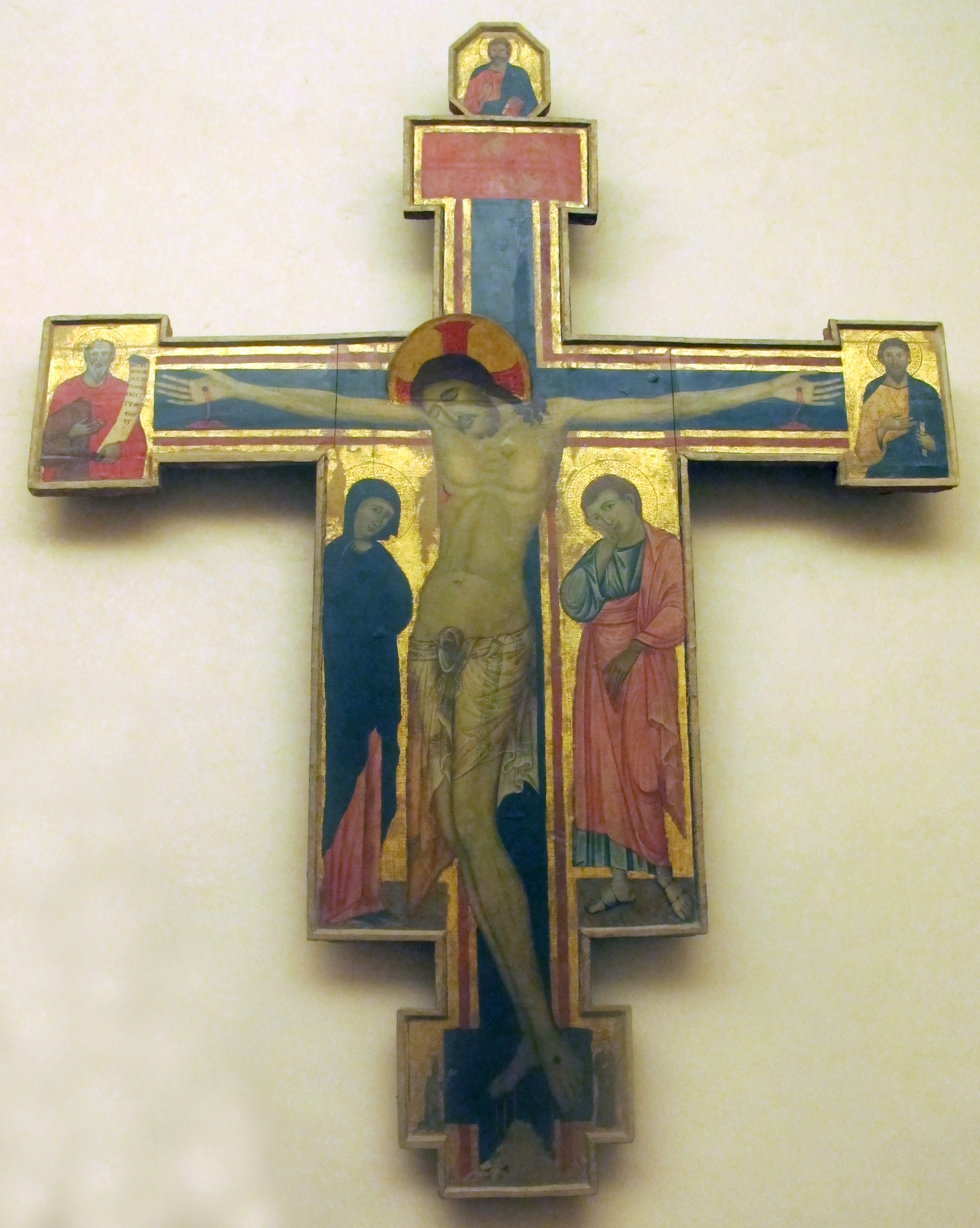 Mostra Ritorni, 2013